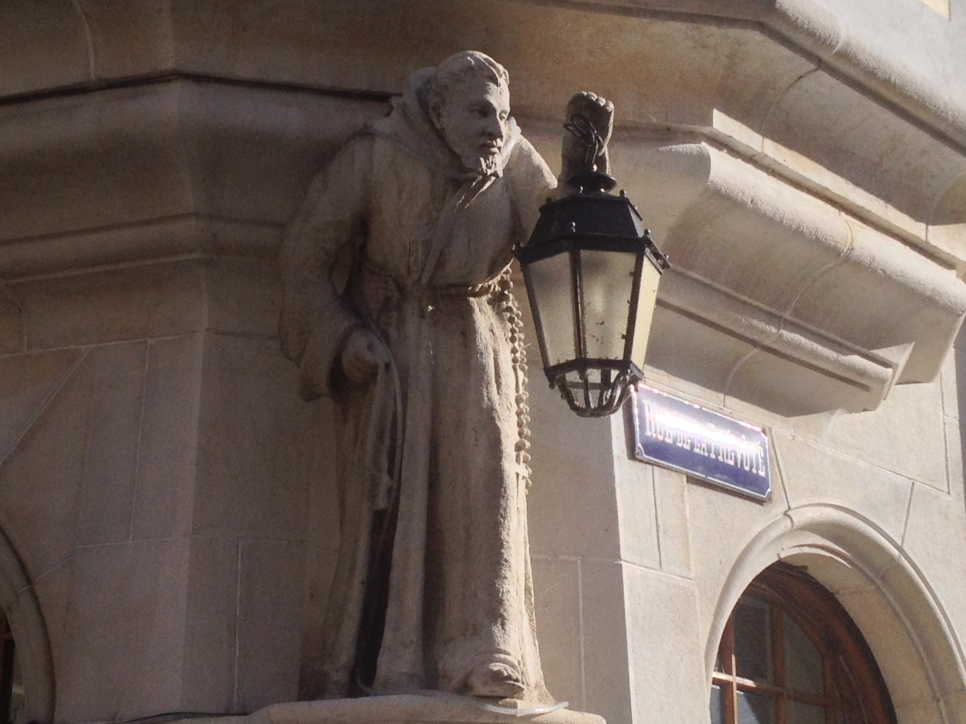 Statue utilisée comme candélabre en vieille ville de Moutier.